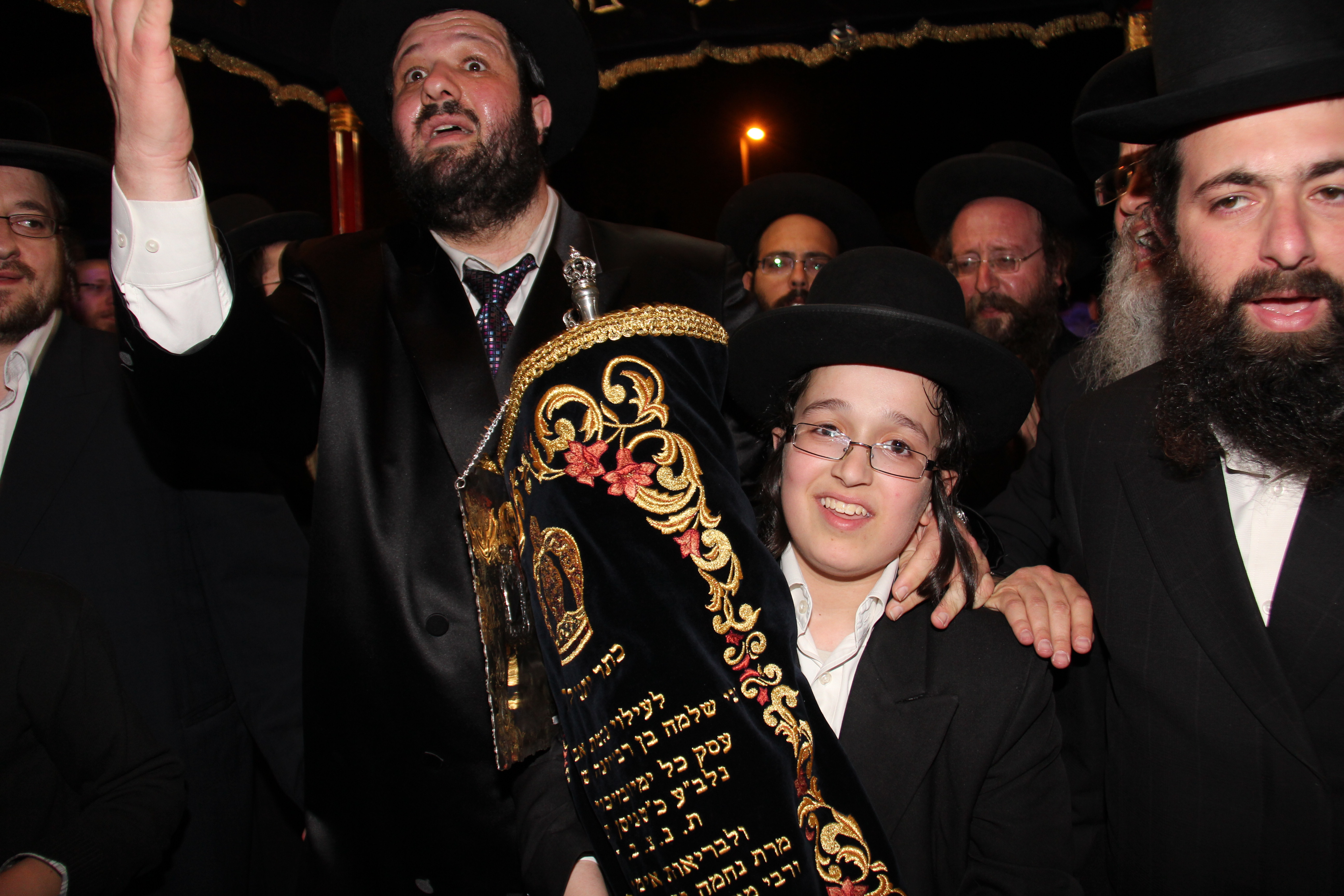 Sefer Torah in memory of Rabbi Shlomo Shtenzel in Beitar Illit Featuring Rabbi Asher Weiss Rabbi yonatan Shtencel